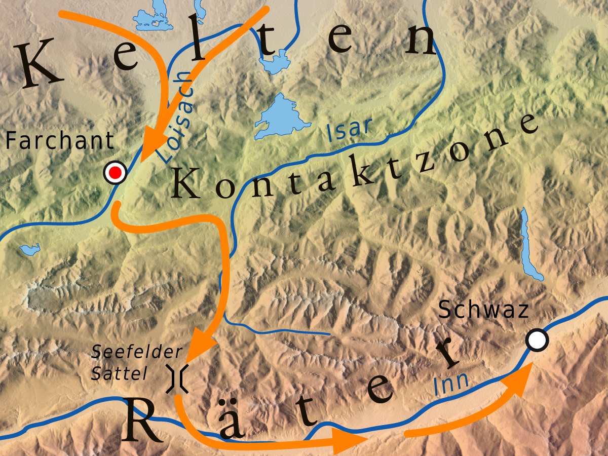 Die Kontaktzone der Kelten und Räter bei Farchant und die Verkehrsverbindung vom Voralpenland ins Inntal.